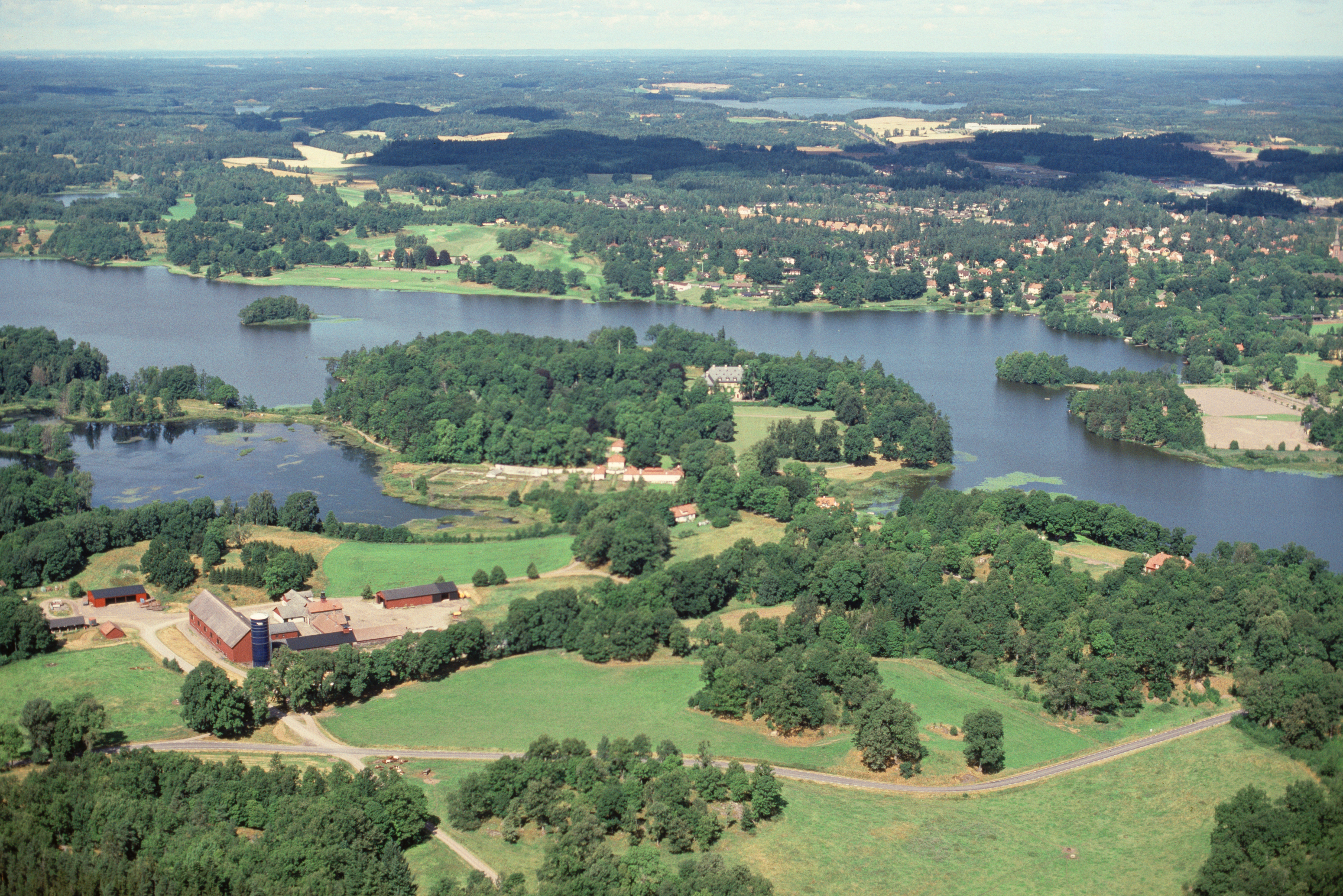 .. Motiv: Adelsnäs Nyckelord: Flygbilder, Riksintressen Kategori: Herrgårds-/slottslandskap .